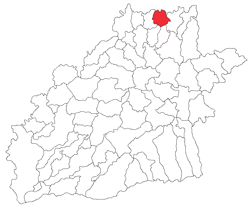 Gemeinde Alma im Kreis Sibiu in Rumänien (eigenständige Gemeinde seit 2004)